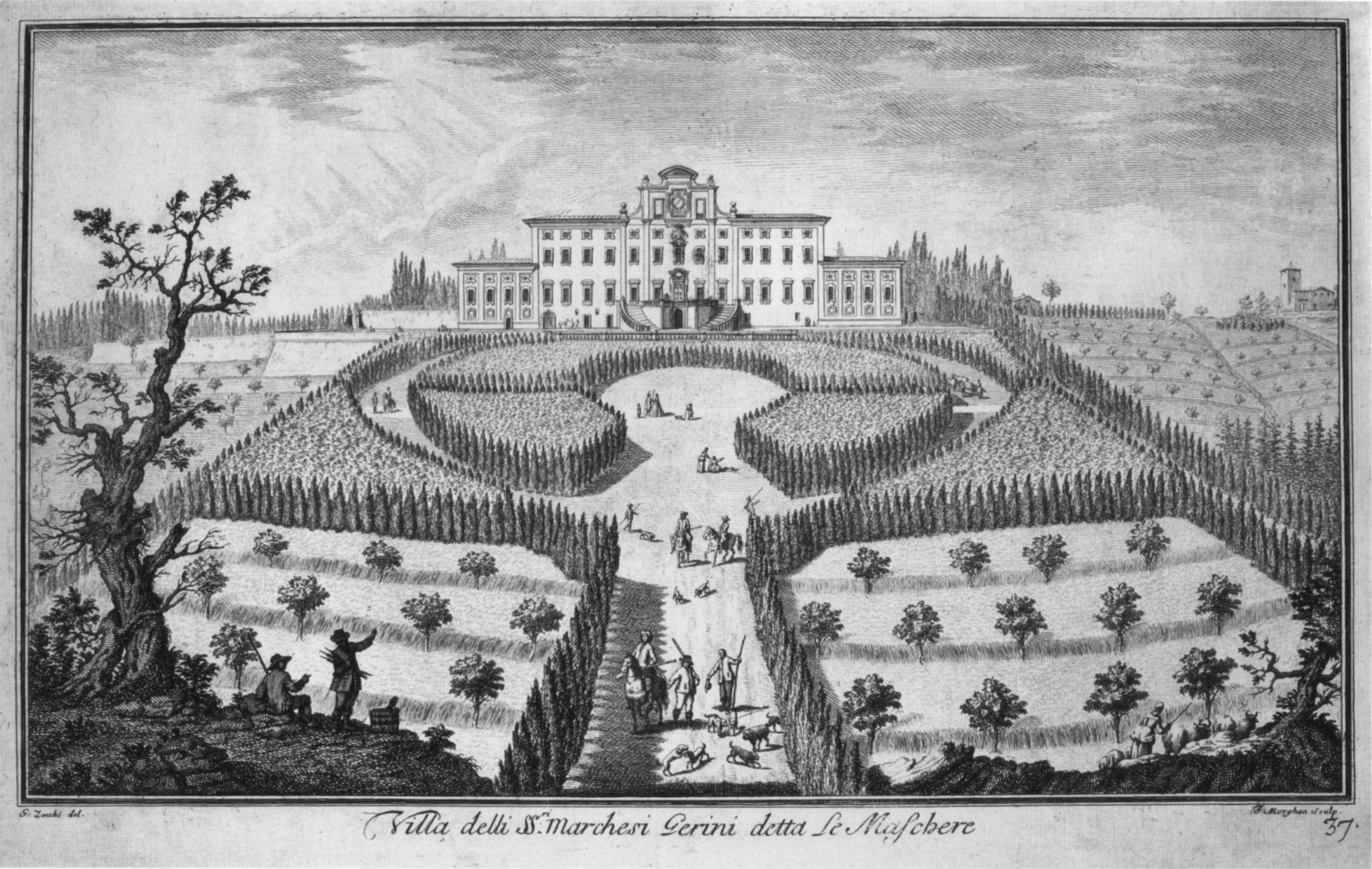 Zocchi, ville 39 maschere